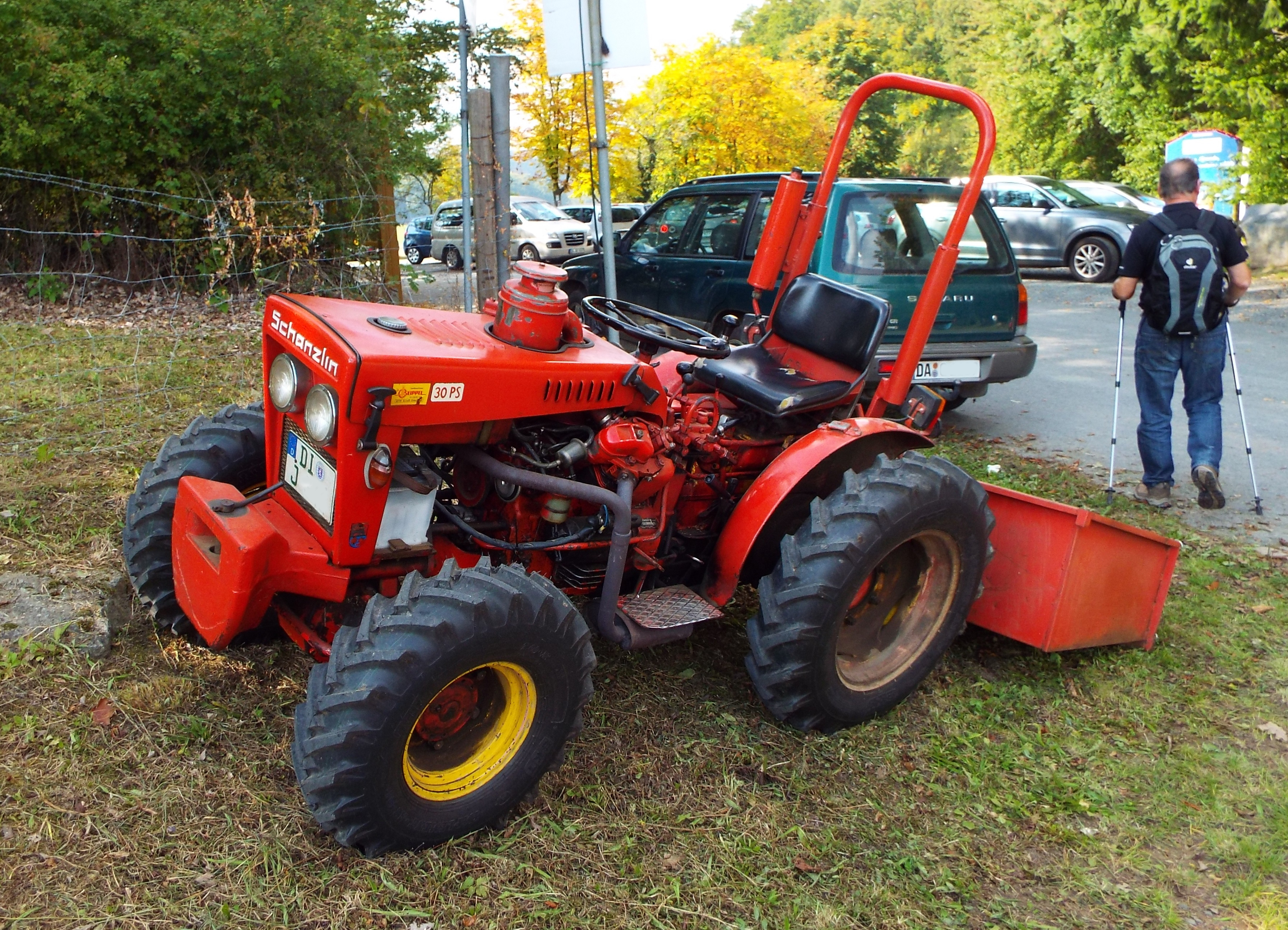 Vierradschlepper - Schmalspurtraktor Schanzlin